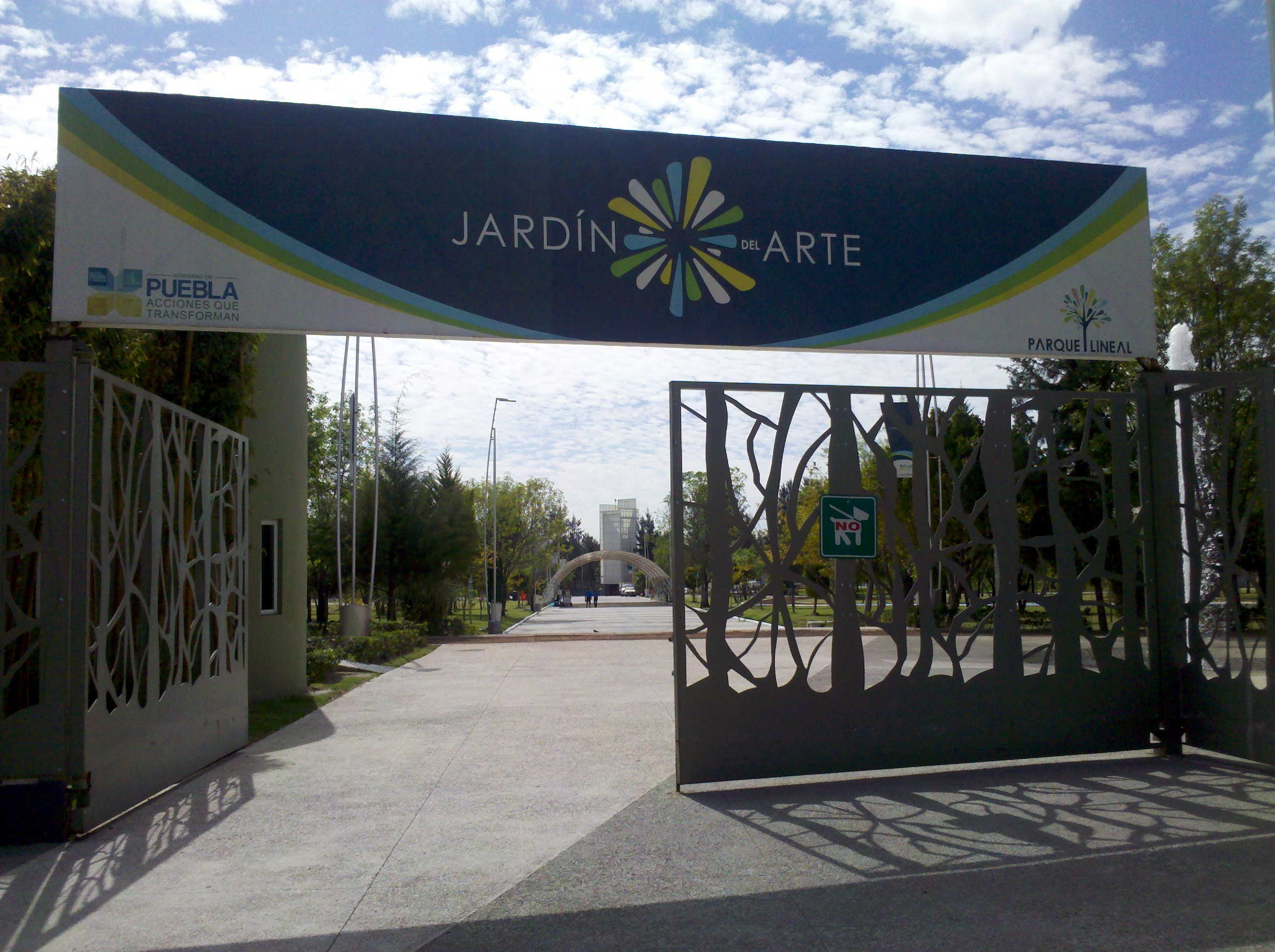 Jardín del Arte, Puebla, México. Boulevard del Niño Poblano entre Sirio y Osa Mayor.